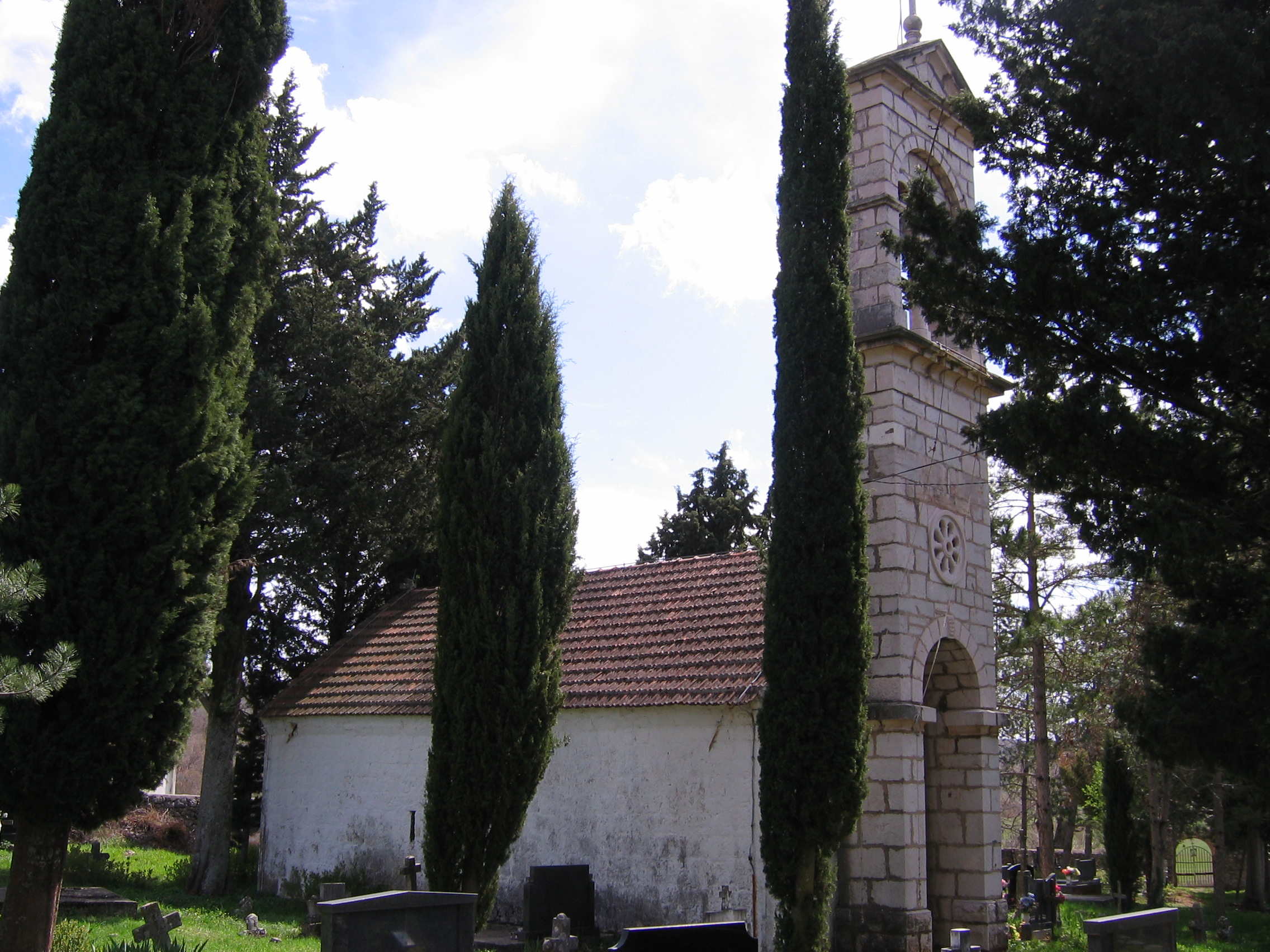 Pravoslavna crkva Svetog Luke u Mokrom Polju.